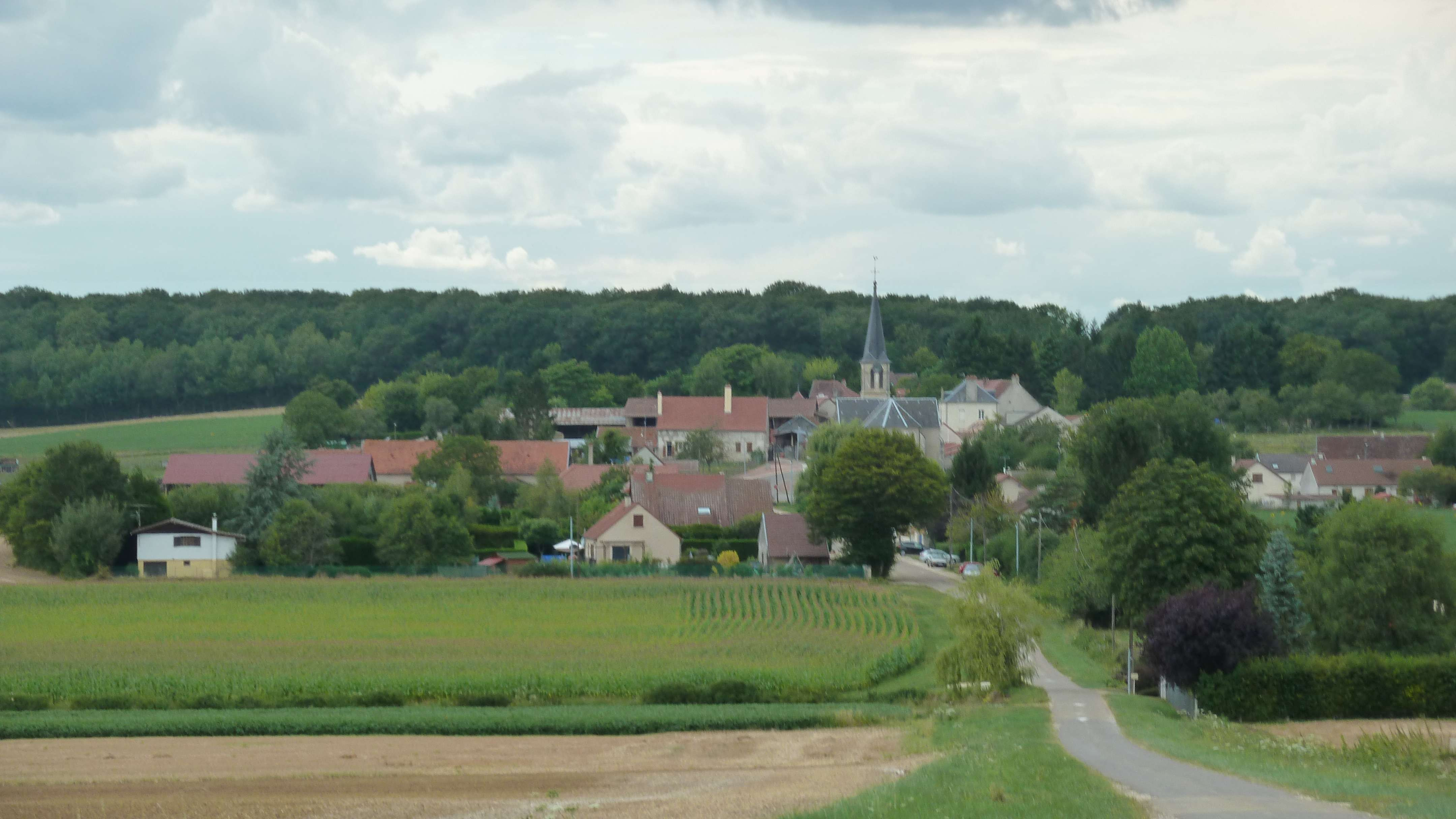 Entrée du village de Tellecey, direction de Lamarche sur Saône.